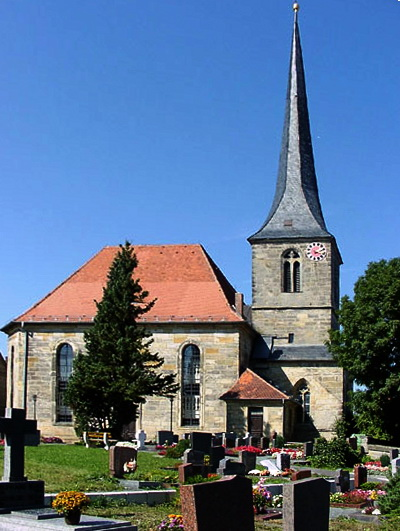 St. Ägidiuskirche, Eckersdorf